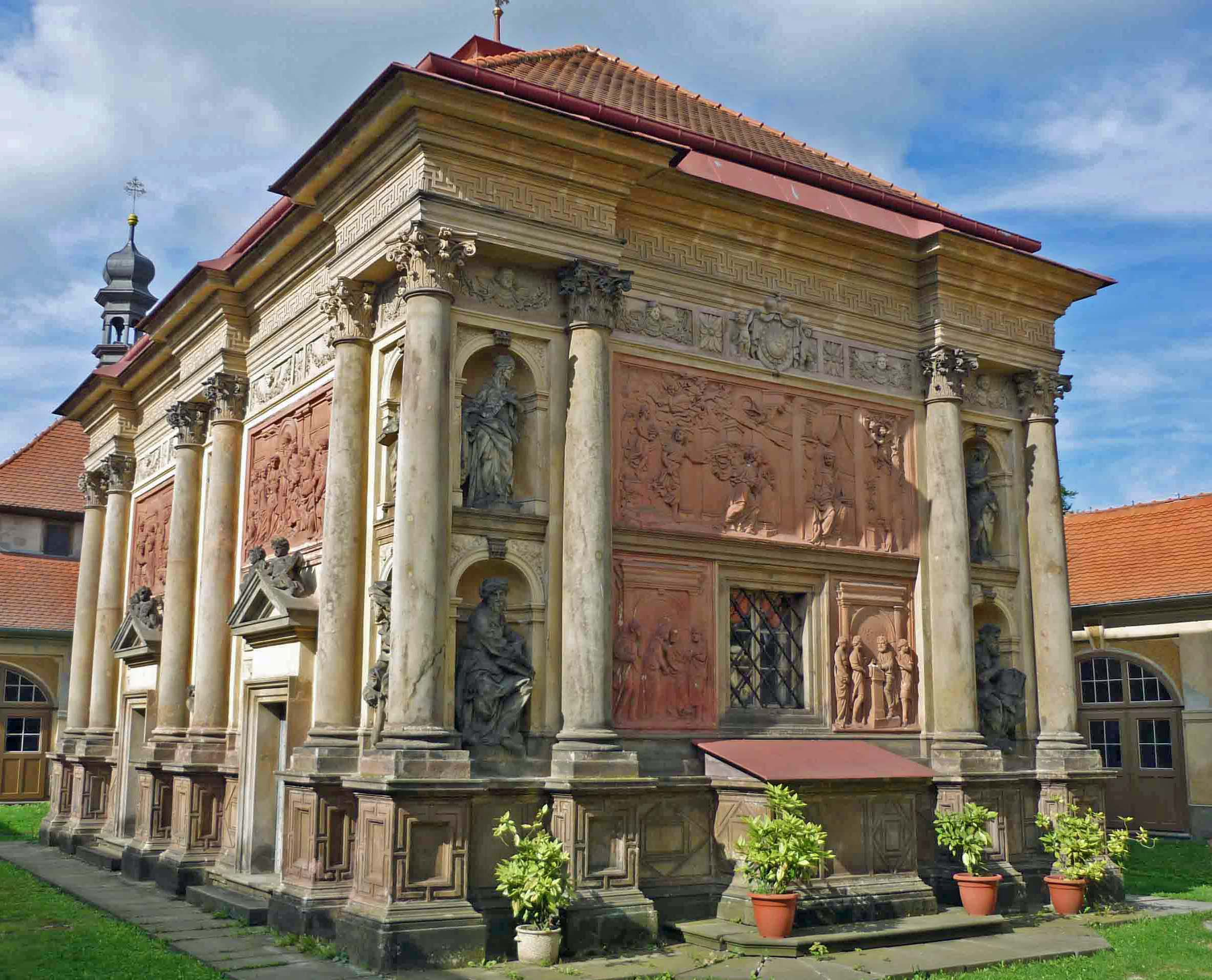 Loretokapelle in Rumburg (Rumburk) in Nordböhmen